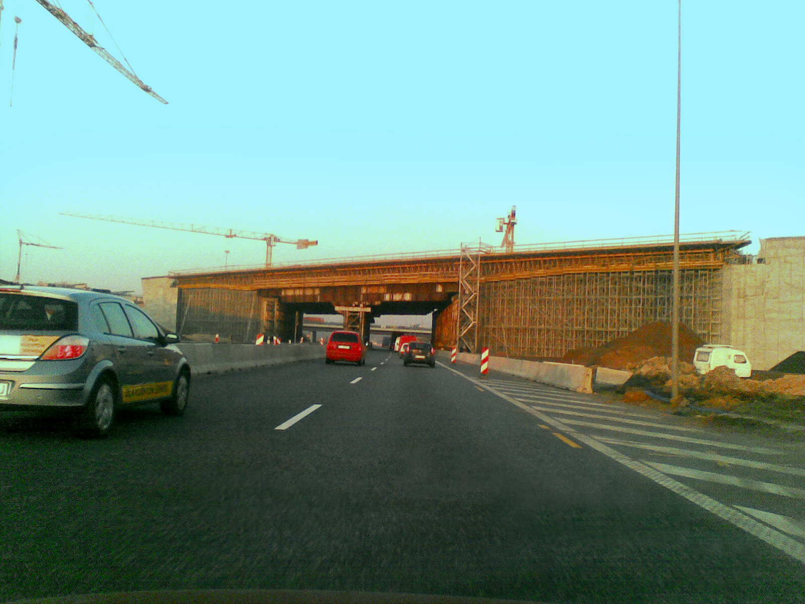 Widok z autostrady A4 od strony Wrocławia w kierunku Katowic na budowany most w ciągu autostrady A1. Stan budowy węzła z kwietnia 2009.